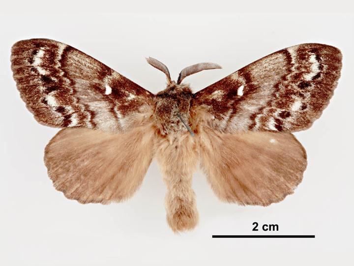 Dendrolimus superans sibirica male, dorsal view